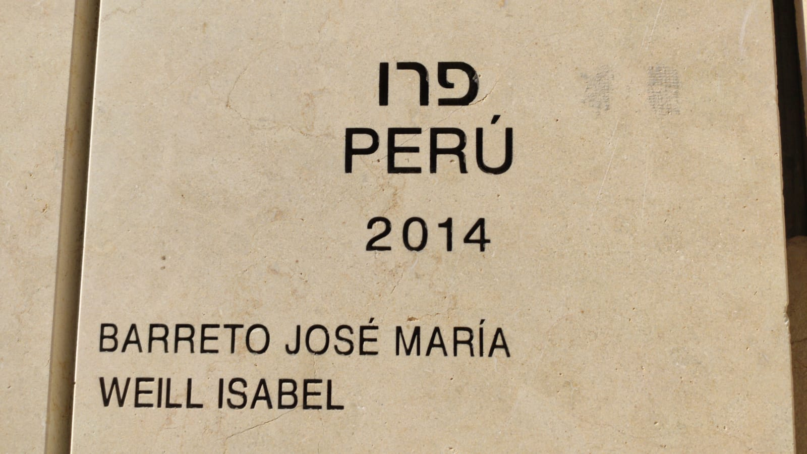 תמונת של אבן זיכרון עבור חסידי אומות עולם מפרו, הנמצאת בקיר ההנצחה ביד ושם.